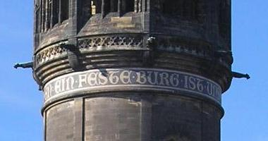 Wittenberg, Schlosskirche, Schriftzug am Turm